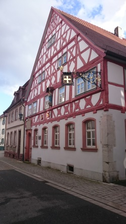 Lauda Kulturdenkmal